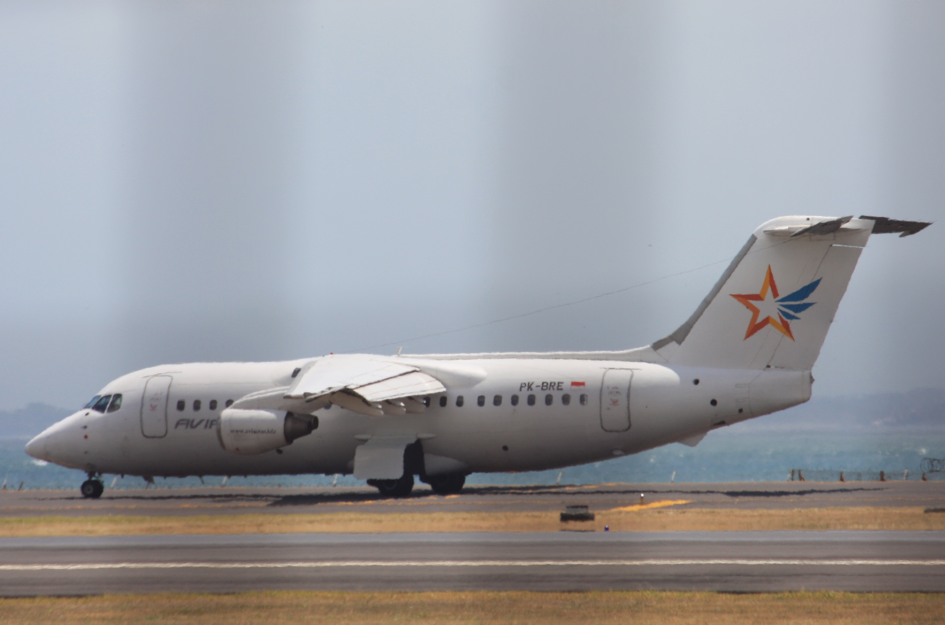 Denpasar / Bali - Ngurah Rai International (DPS / WADD) Indonesia, August 17, 2012.